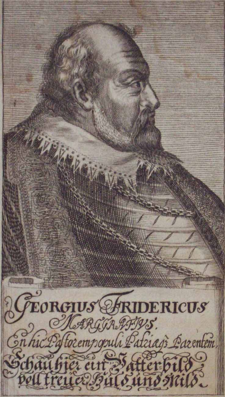 Markgraf Georg Friedrich von Brandenburg-Kulmbach Kupferstich aus I. W. Rentsch, Brandenburgischer Cedernhain, Bayreuth 1682 - Künstler unbekannt.